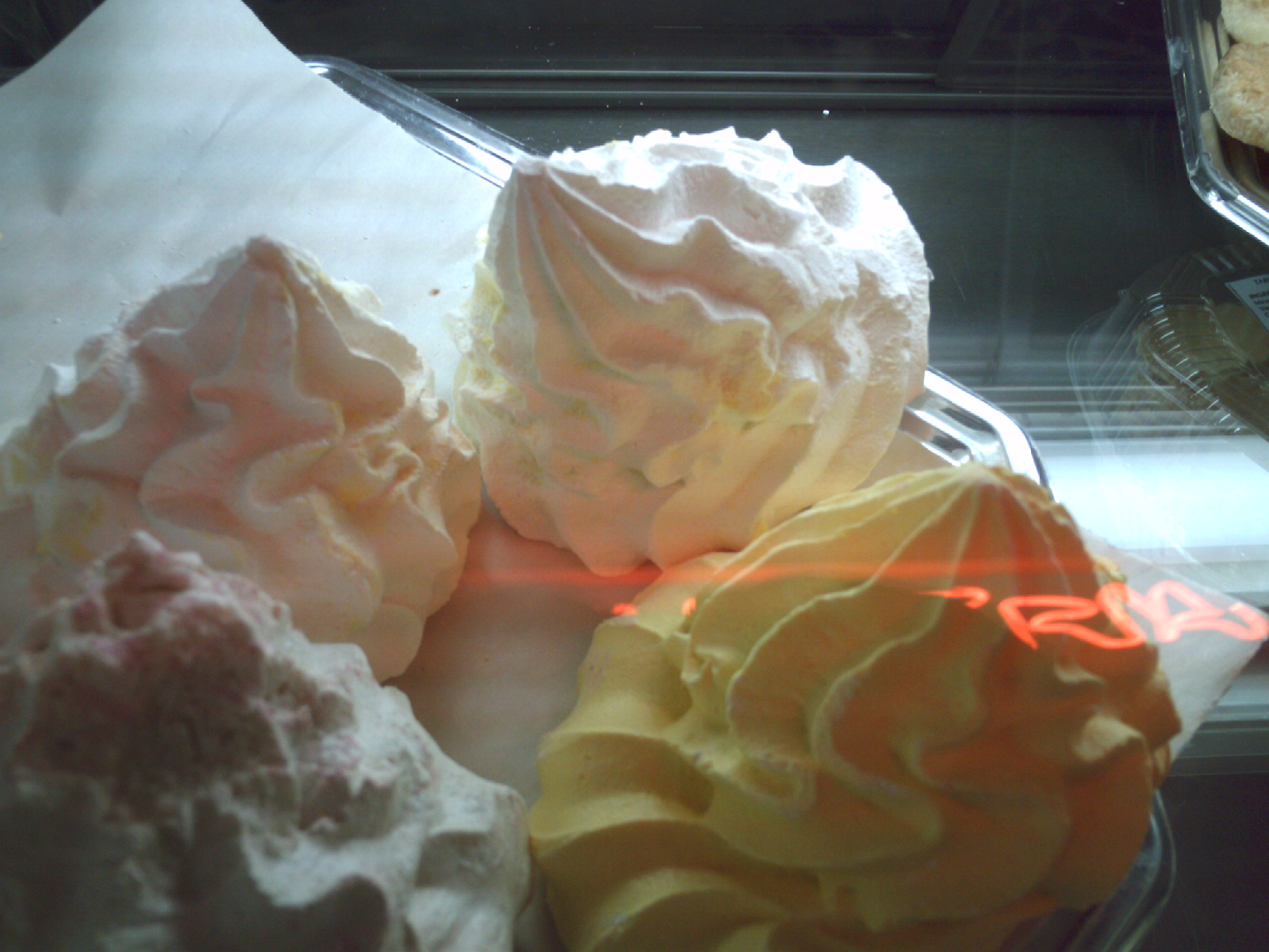 Dulce de Suspiro o Merengue en panadería